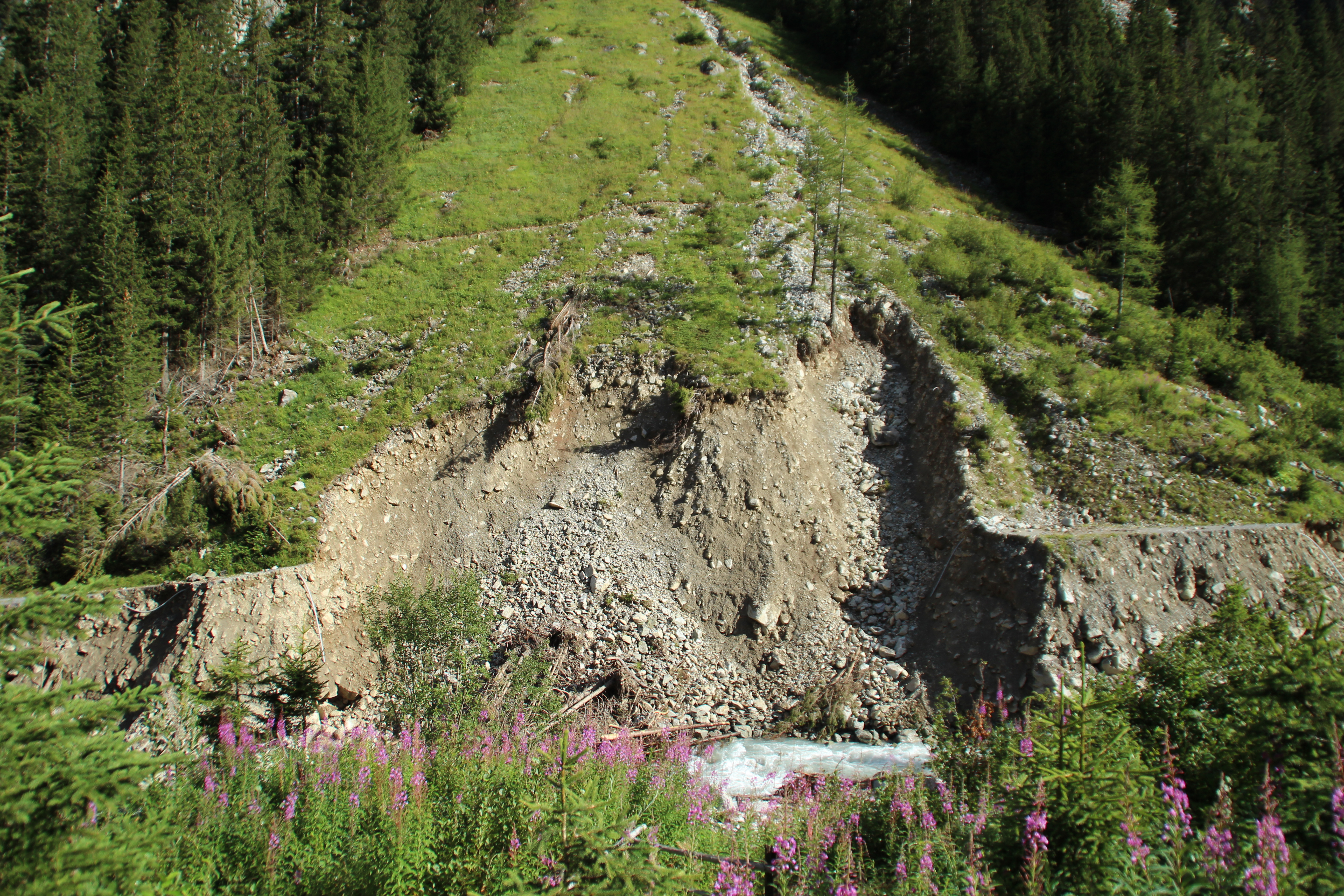 Gasterntal: Unwetter am 10. Oktober 2011 in Selden abgerutschter Wanderwegweg (Anriss) zwischen Selden und Heimritz